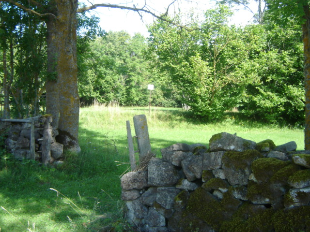 Vana kiviaed mille taga on Pidula maalinn